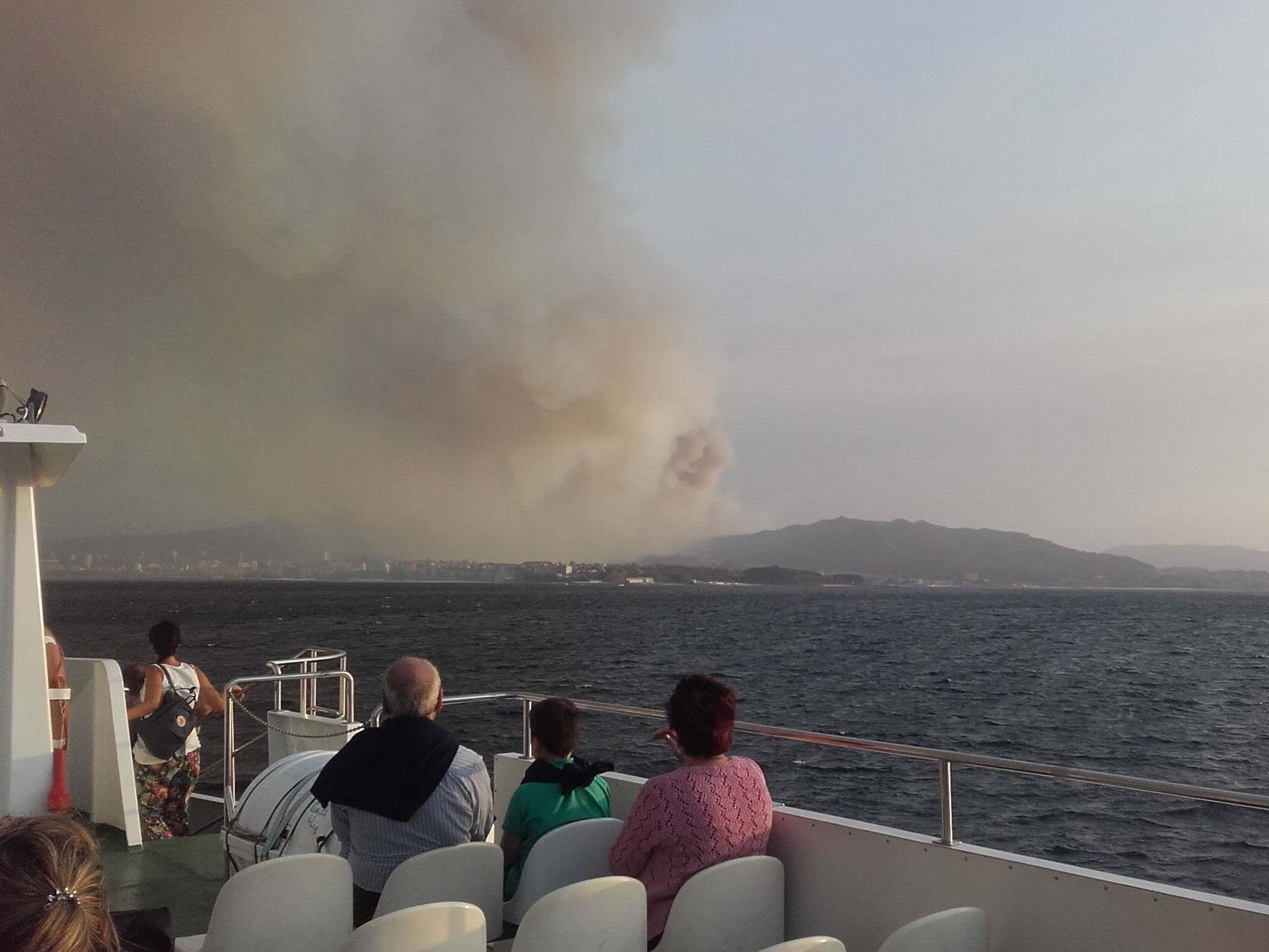 Nube de fume sobre a cidade de Vigo pola vaga de incendios.